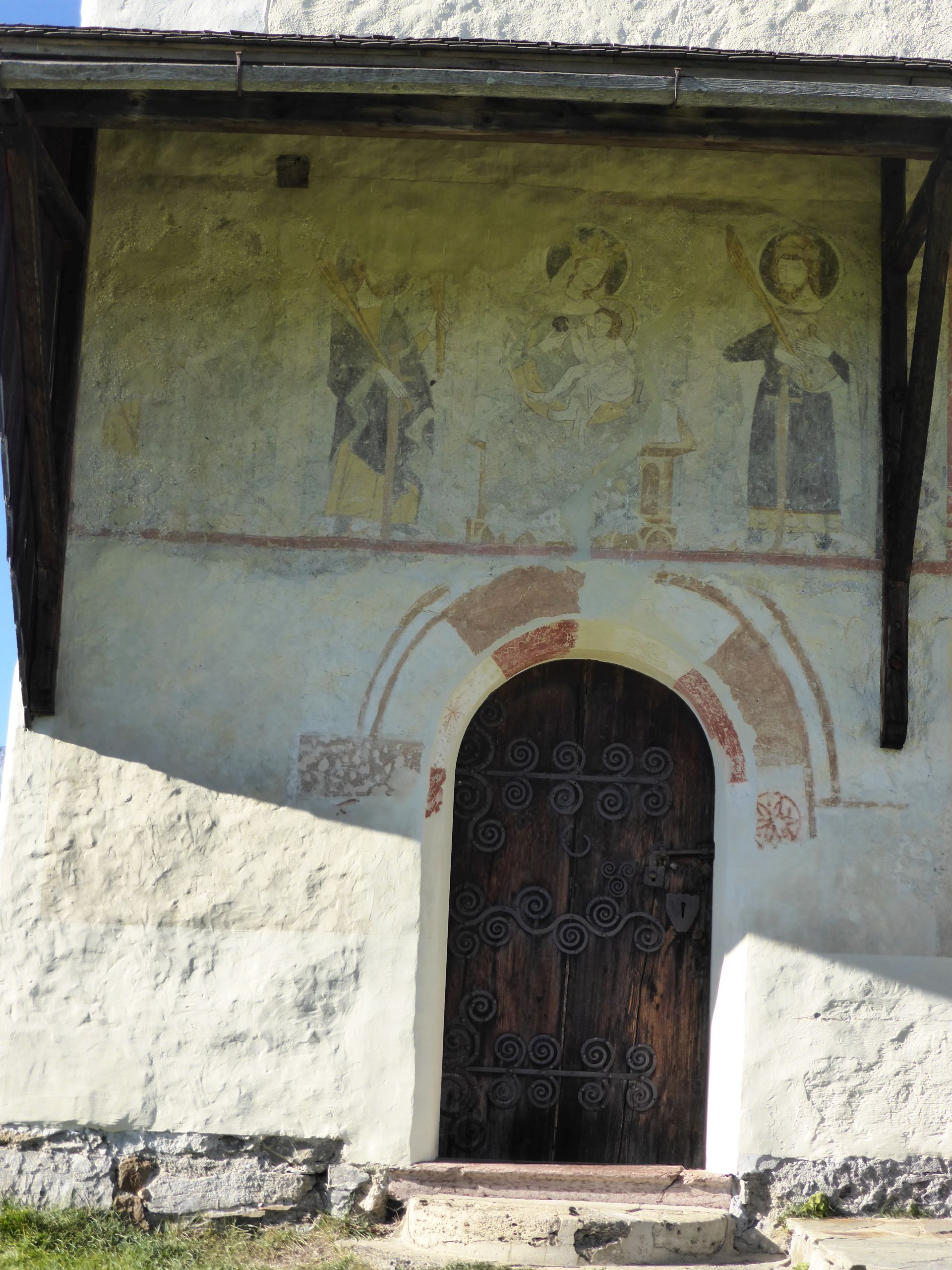 Kath. Filialkirche hll. Primus und Felizian in Buchberg